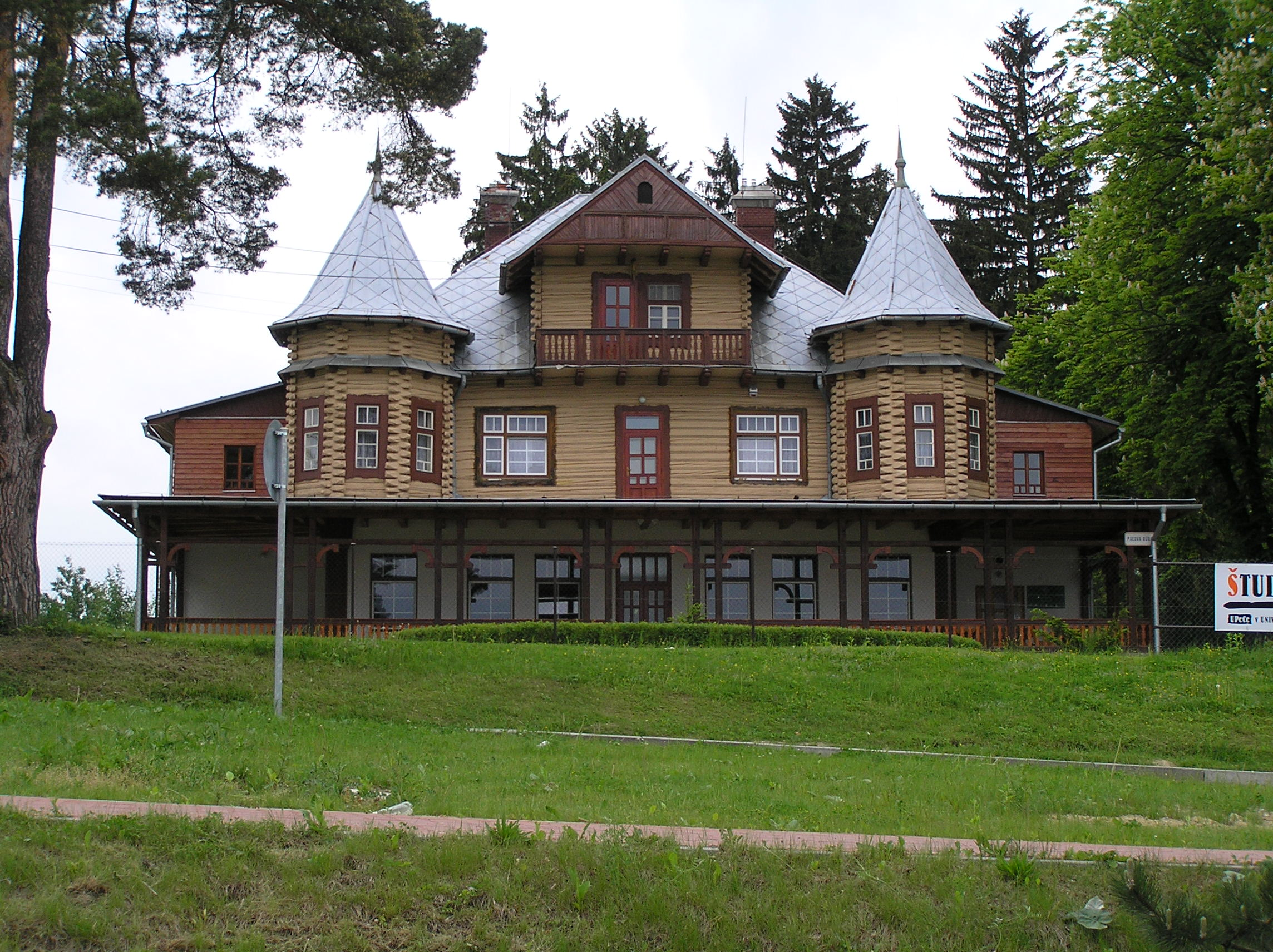 Žilina, pohľad z Veľkého dielu: Žilinská univerzita, nová budova rektorátu